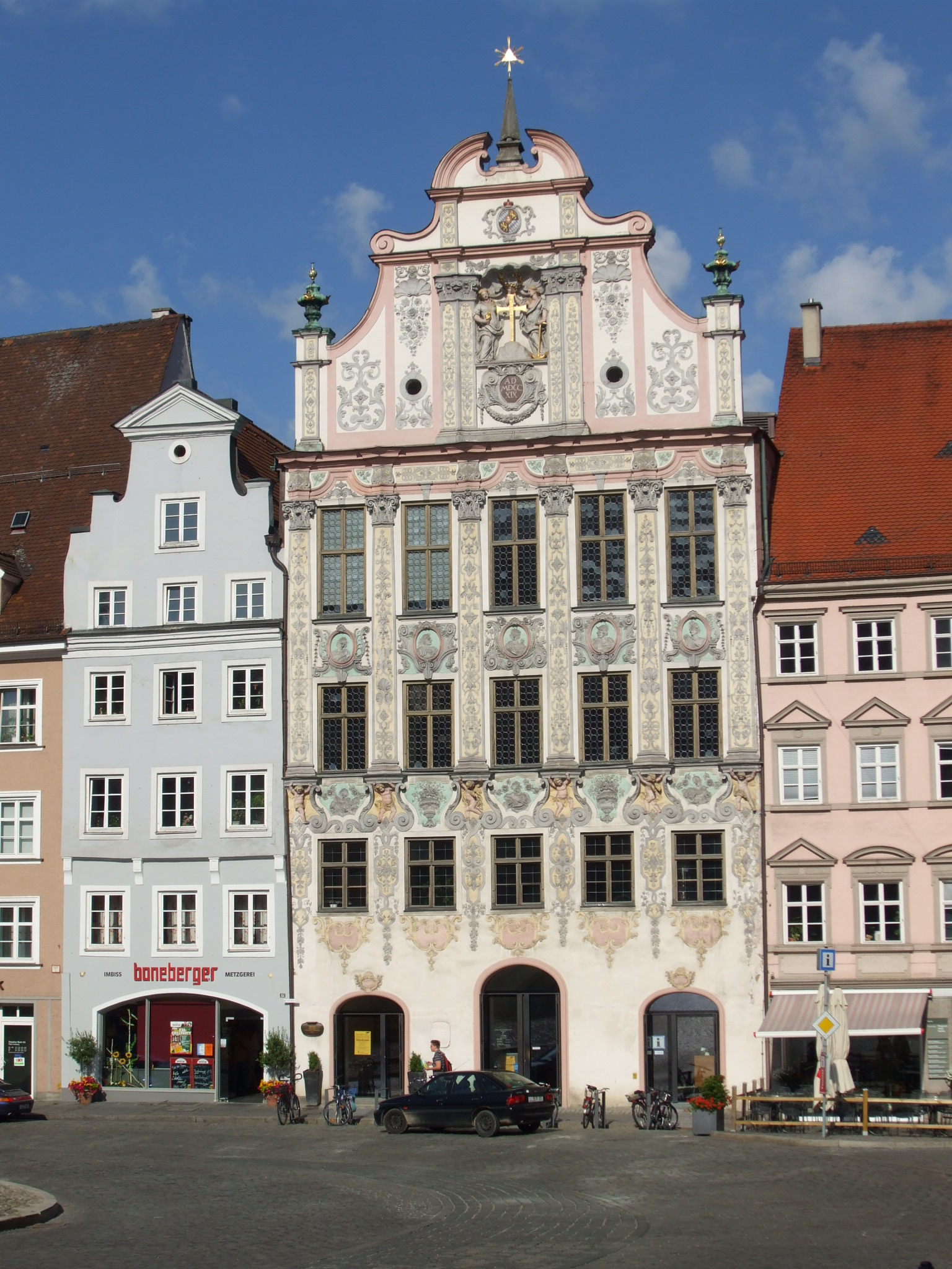 Historisches Rathaus in Landsberg am Lech